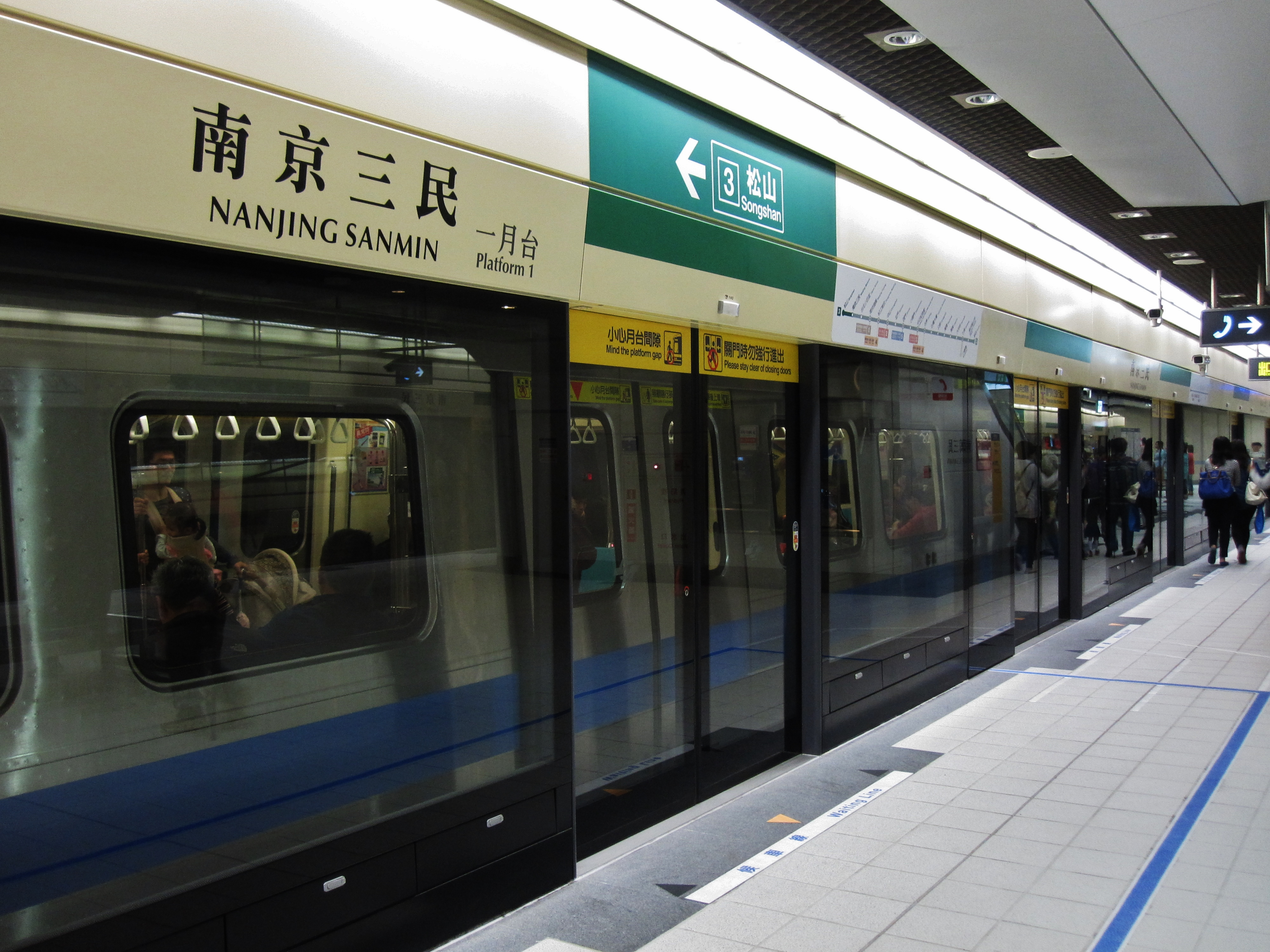 中文（台灣）: 捷運松山線南京三民站一月台